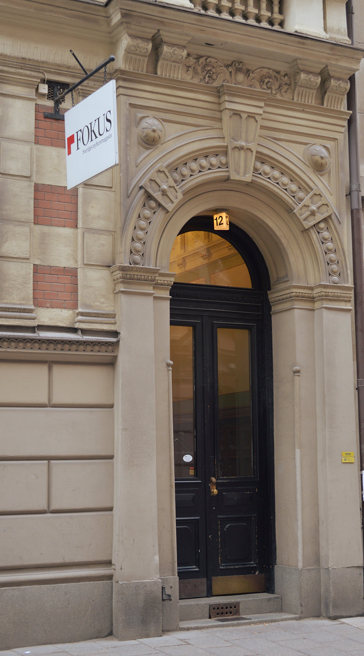 Skylten utanför tidskriften Fokus redaktion på Wallingatan i Stockholm, Sverige.